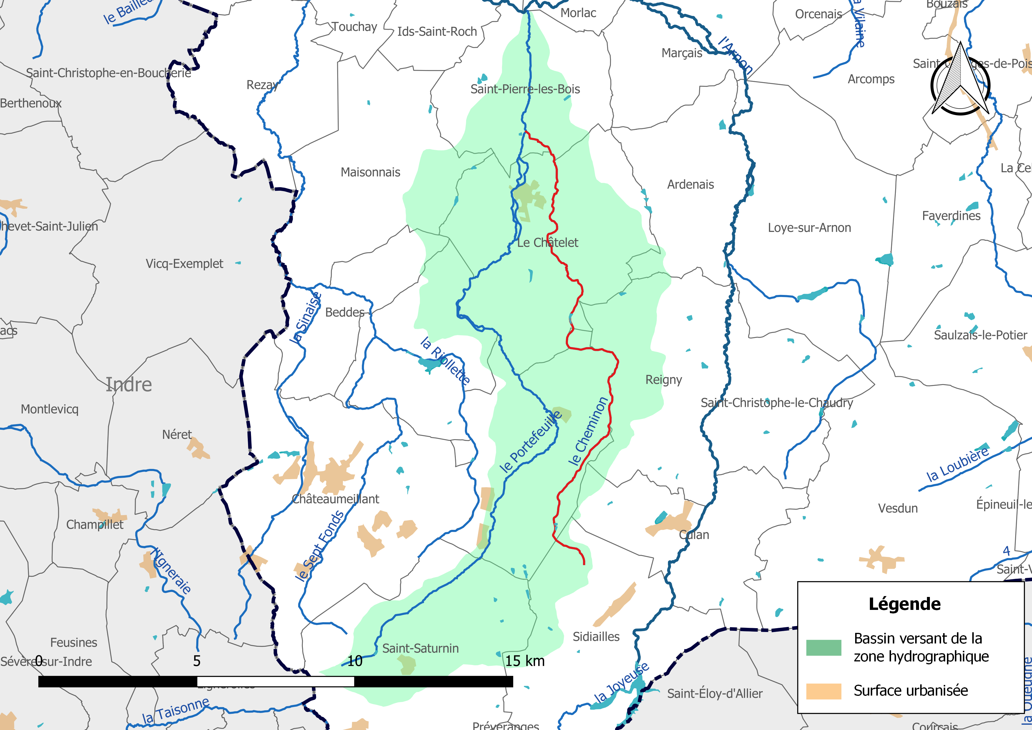 Carte du cours d'eau « le Cheminon » (France) et de la zone hydrographique dans laquelle il s'insère.